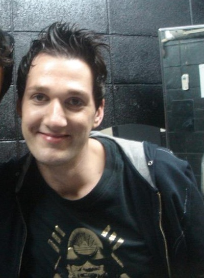 Ronski Speed in Osaka